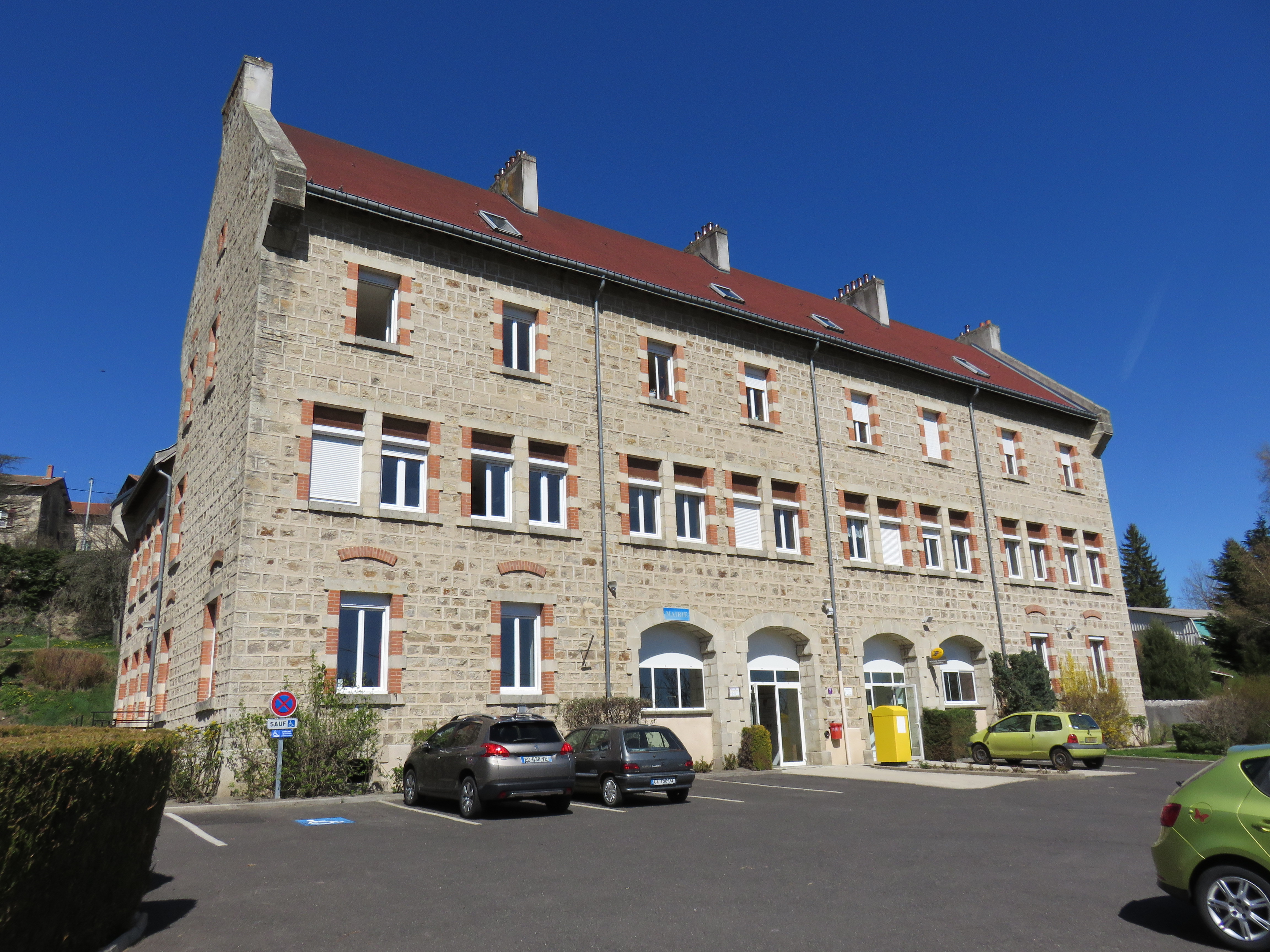 Mairie de Sauvessanges (Puy-de-Dôme, France).